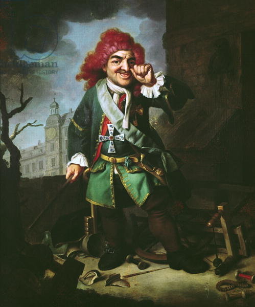 Hofnarr Clemens Perkeo vor dem Schwetzinger Schloss, um 1725